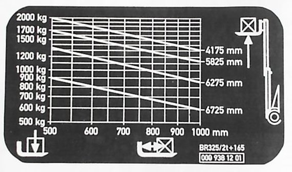 Plaque de charge d'un chariot élévateur, foklift